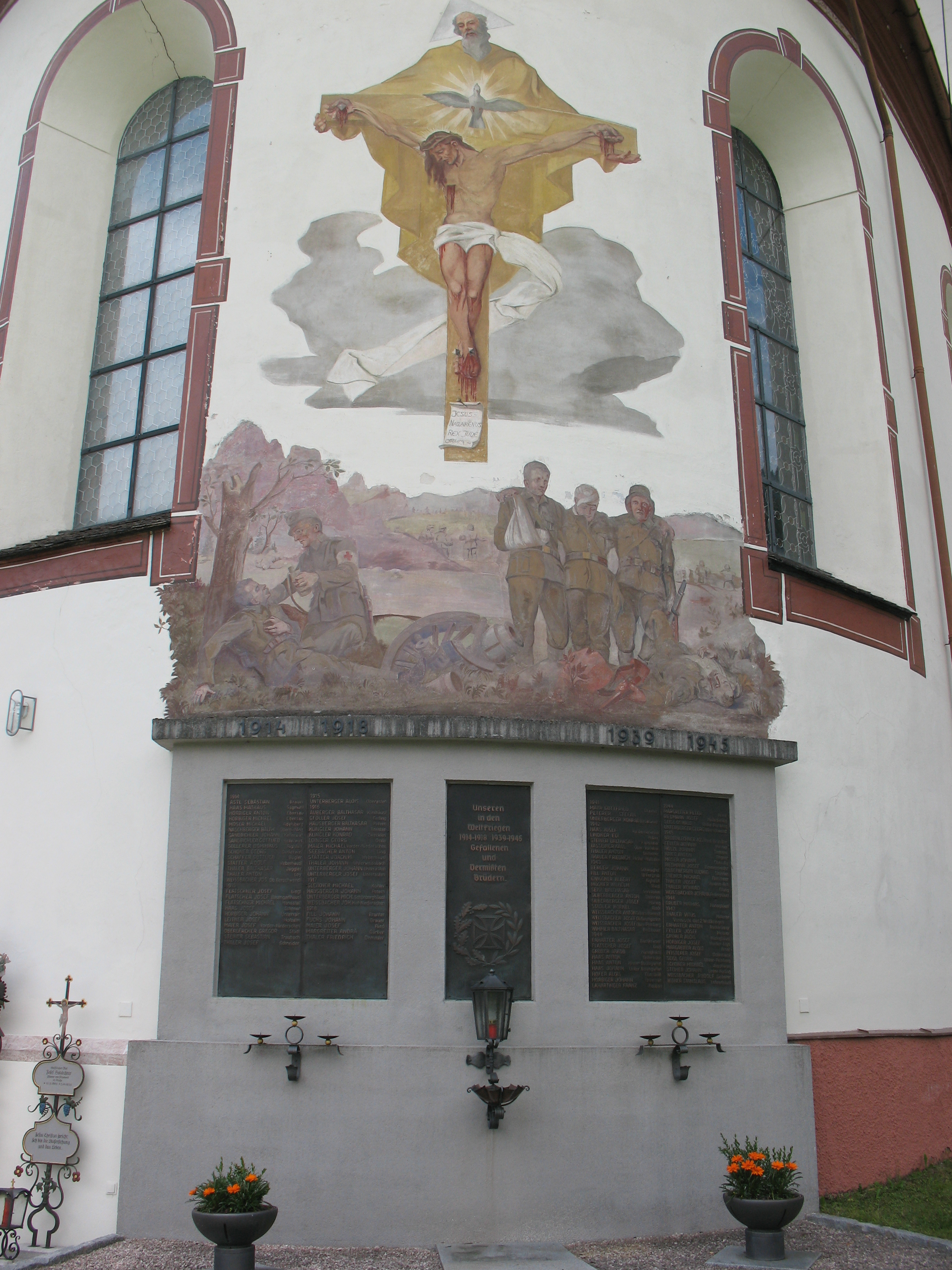 Kath. Pfarrkirche hl. Margaretha und Kriegerdenkmal This media shows the remarkable cultural object in the Austrian state of Tyrol listed by the Tyrolean Art Cadastre with the ID 12741. (on tirisMaps, pdf, more images on Commons, Wikidata)